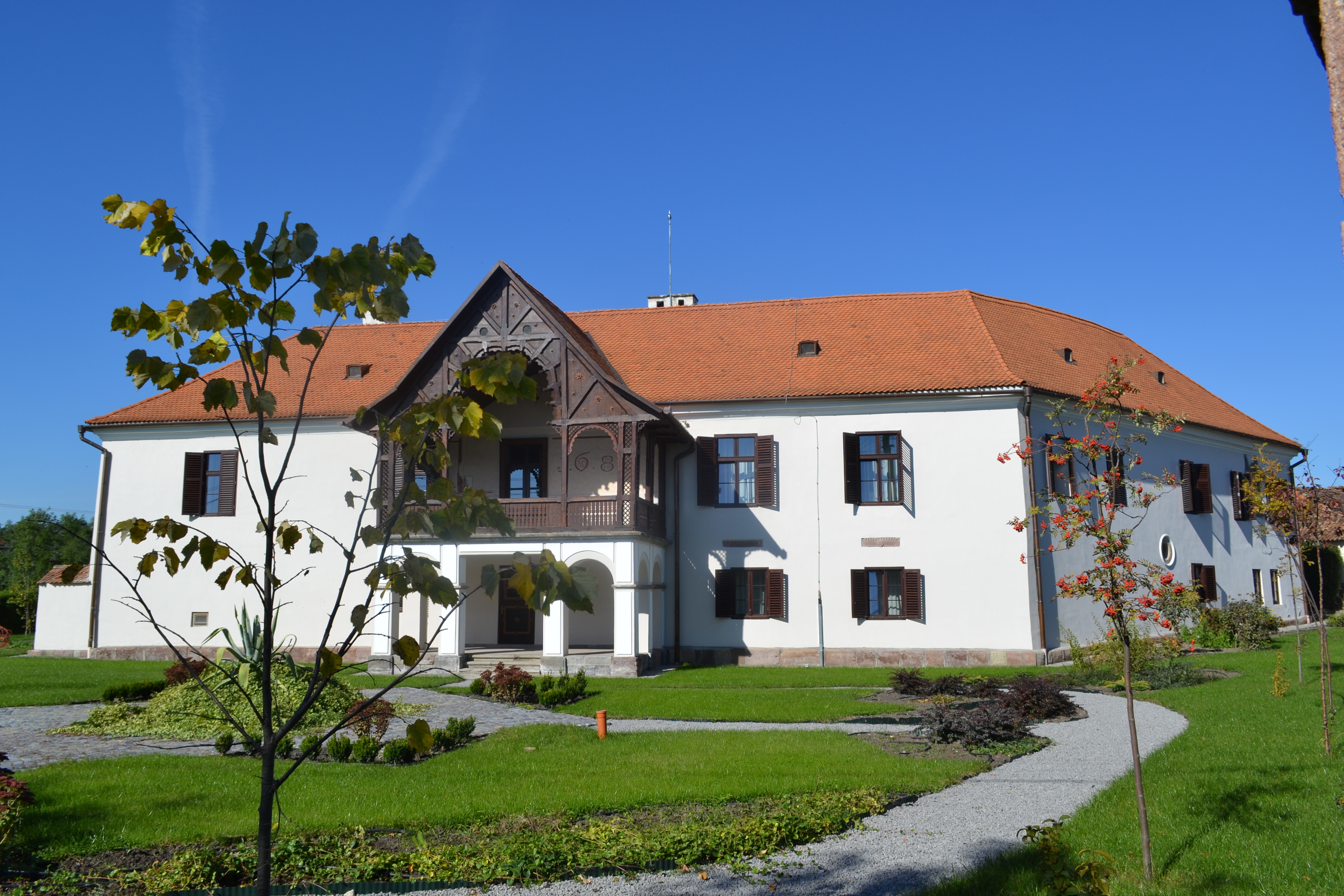 Castelul Daniel Tălișoara